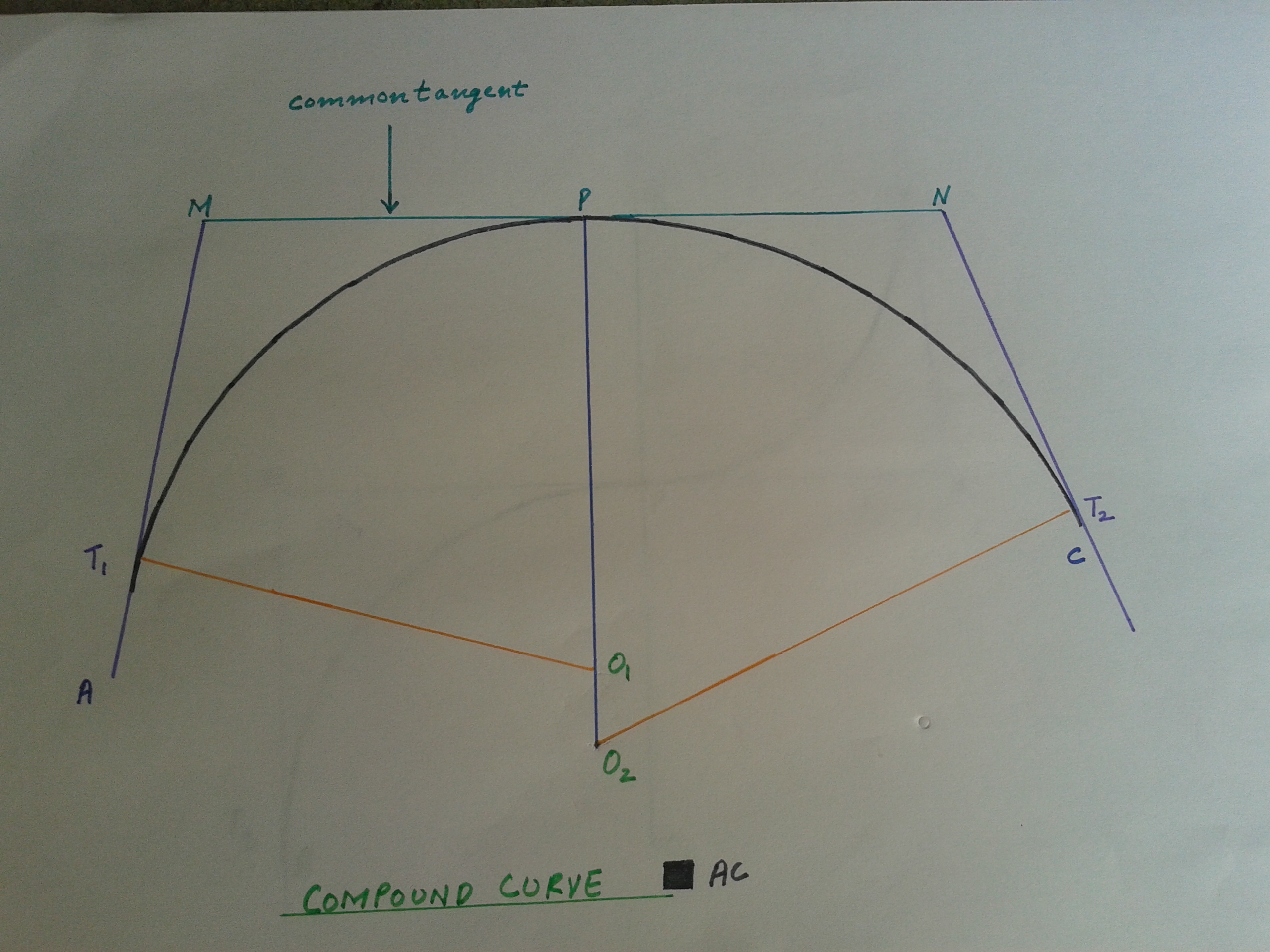 Road curve